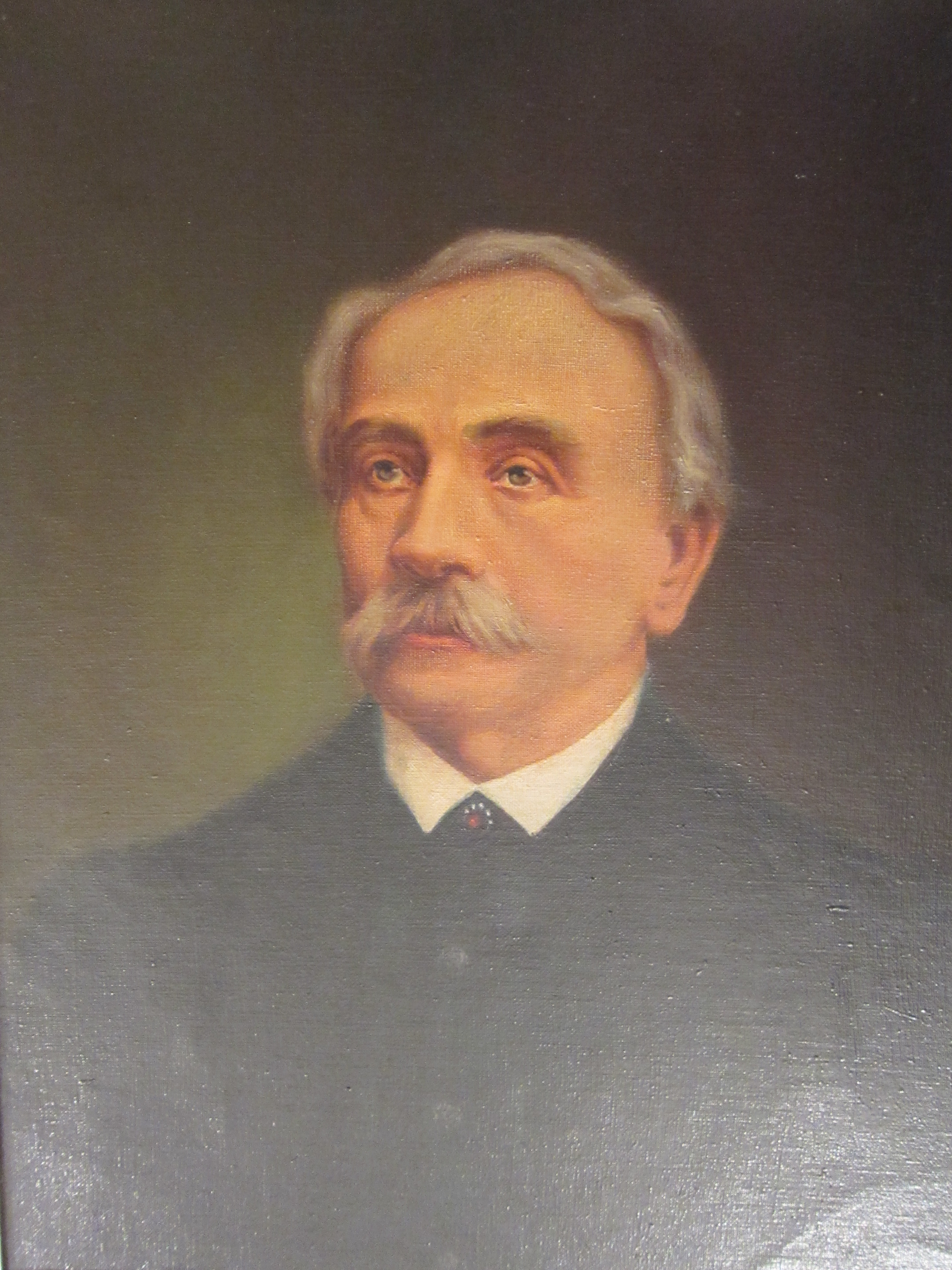 Kapitan Edmund Kraiński około 1870 - 1880